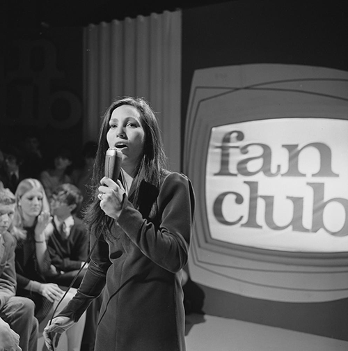 Julie Felix in het televisieprogramma Fanclub